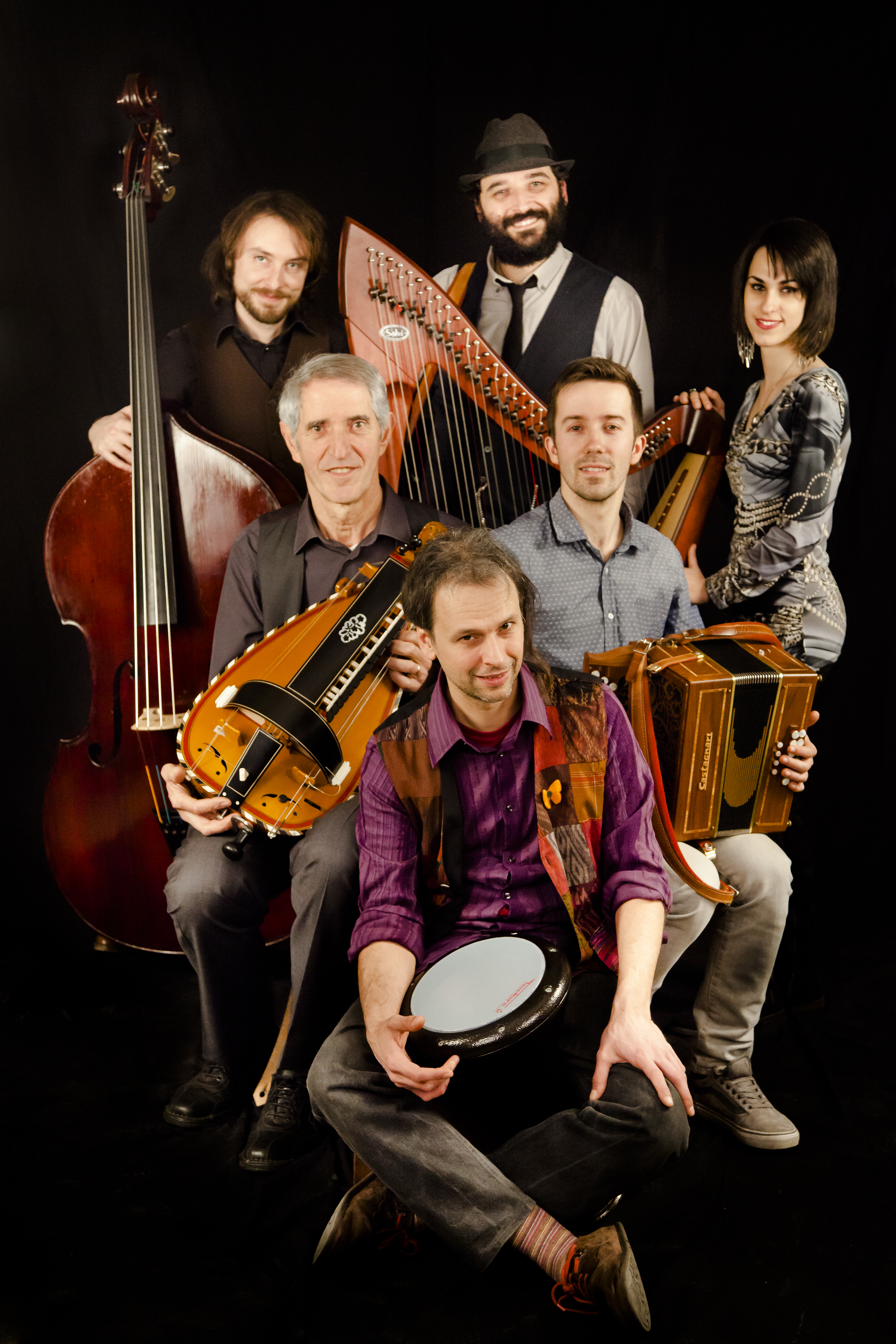 Luca Pellegrino voce, fisarmonica, flauti e cornamusa Remo Degiovanni autore, ghironda, armonica a bocca e voce Manuel Ghibaudo organetto Alessia Musso arpa celtica Giorgio Marchisio contrabbasso Silvio Ceirano percussioni